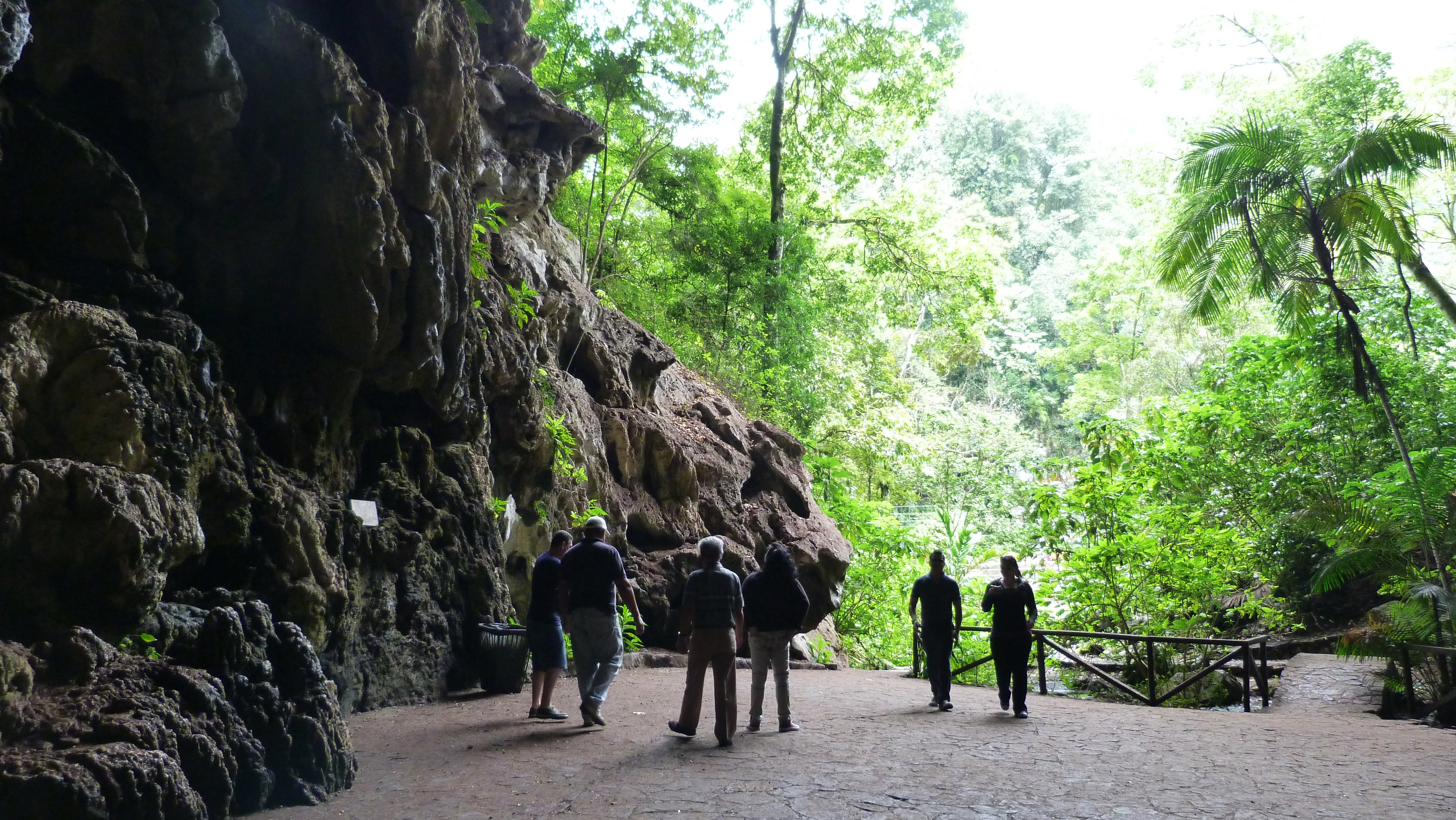 Esta imagen muestra como se ve La cueva desde su interior, siempre esta llena de turistas ya sea en temporada o no, hay personas que van solo para recordarse que viven cerca de un monumento tan hermoso.